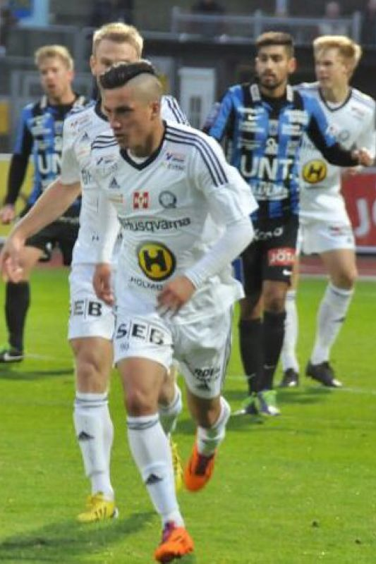 Carlos Ross